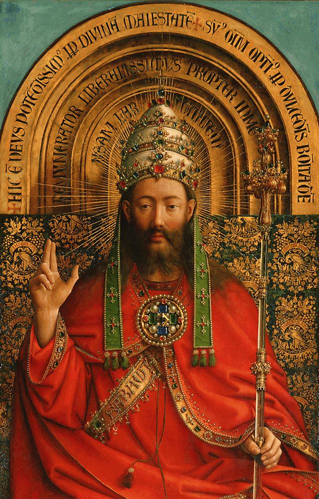 retable de l'Agneau mystique detail